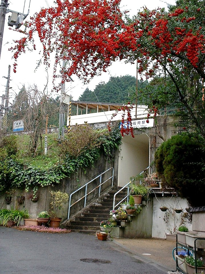 JRja:山陰本線船岡駅 駅入口とホーム